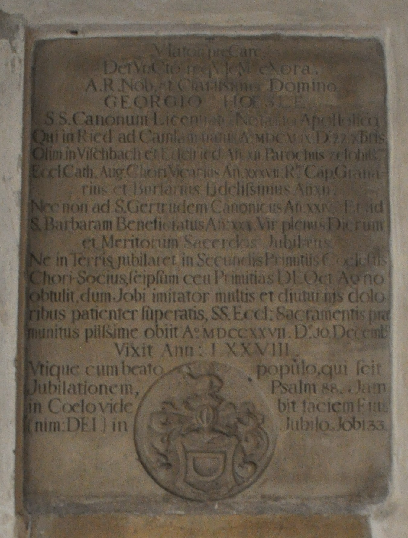 Augsburg, Dom, Kreuzgang, Nordflügel, 9. Joch, Grabdenkmale Kosel Nr. 263, Epitaph für Georg Hösle († 10. Dezember 1727), Solnhofener Stein; Inschrift mit Wappen